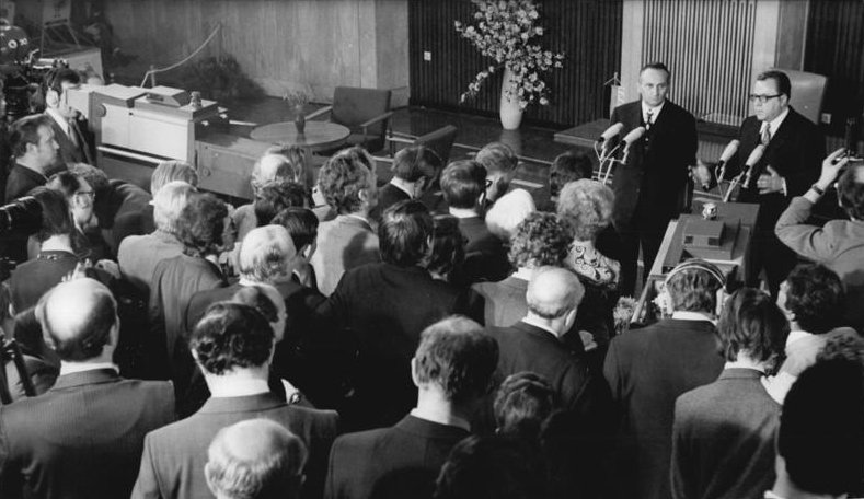 ADN-ZB Link 21.12.72 Berlin: Nach der Unterzeichnung des Berliner Vertrages über die Grundlagen der Beziehungen zwischen der DDR und der BRD am 21.12.72 im Festsaal des Hauses des Ministerrates fand ein Pressegespräch statt. Der Staatssekretär beim Ministerrat der DDR Dr. Michael Kohl (r.) und der Bundesminister für besondere Aufgaben Egon Bahr beantworten Fragen der Journalisten. (siehe ADN-Meldungen)